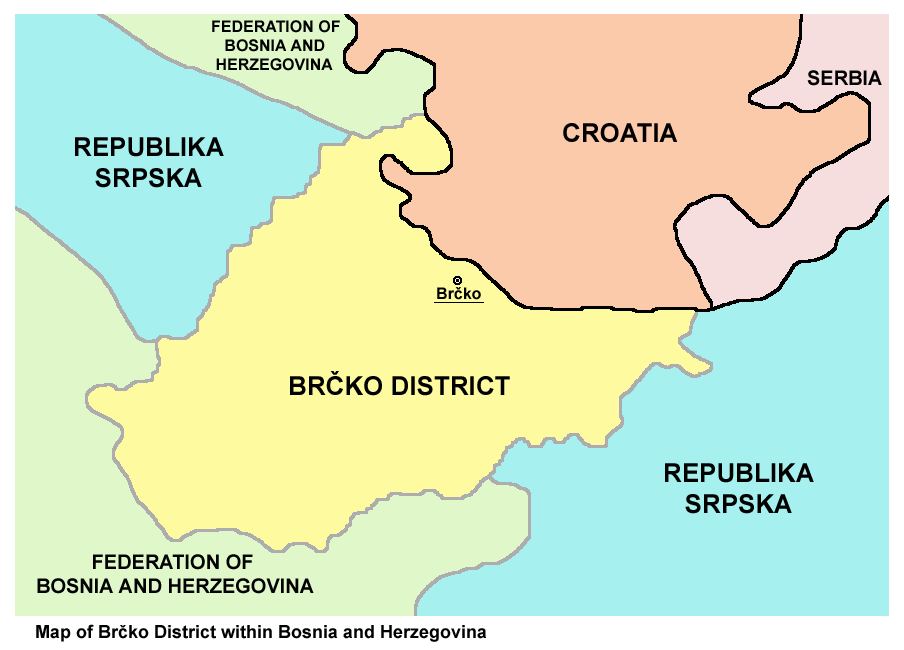 Map of Brčko District. Mapa Distrikta Brčko. Мапа Дистрикта Брчко.